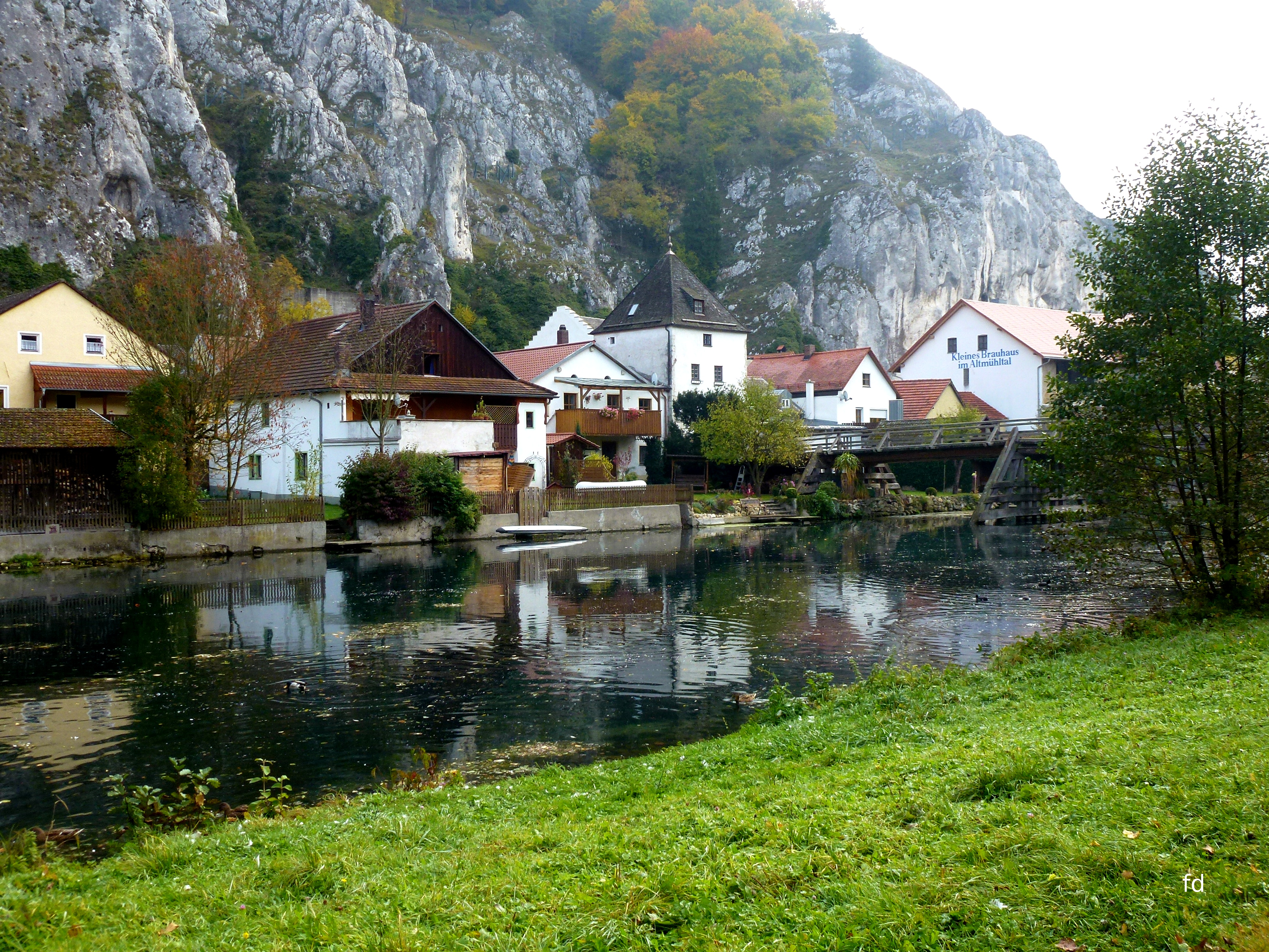 Essing an der Altmühl